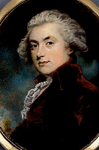 Ritratto di William Robert Spencer